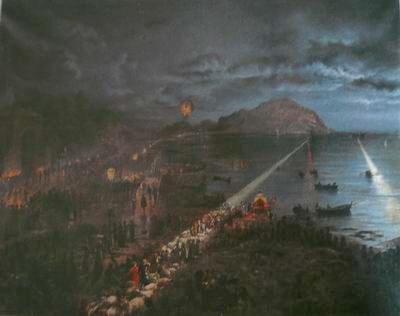 Painting by Kiyohara Tama (Eleonora Ragusa)